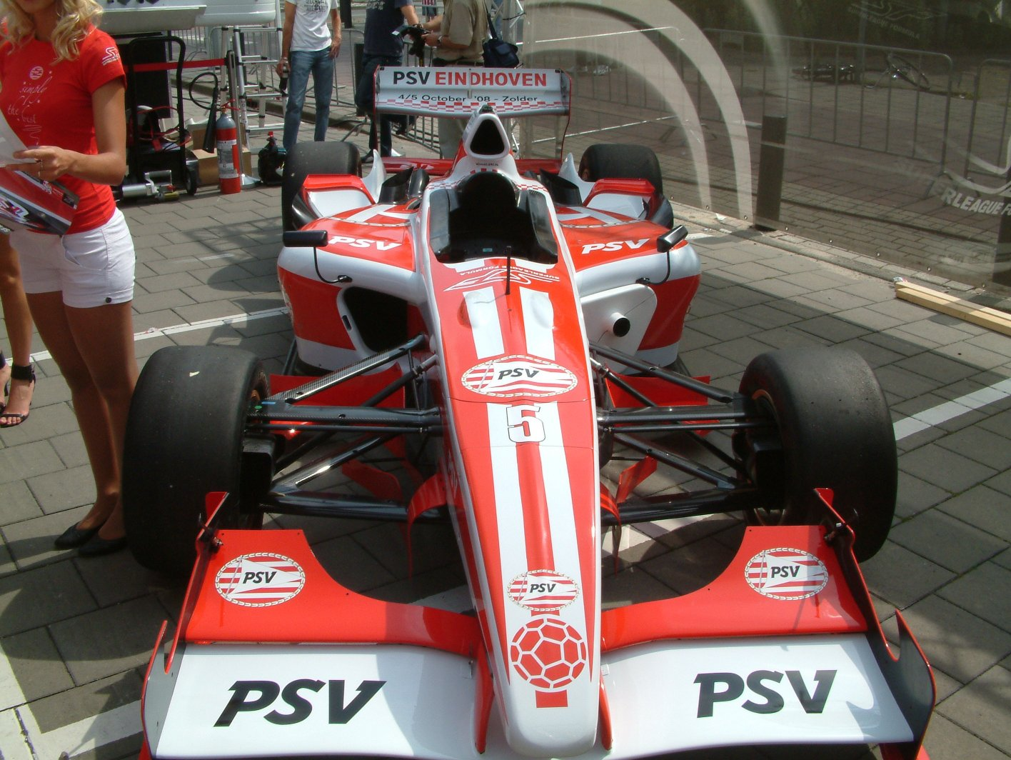 Super League Formula, PSV Eindhoven